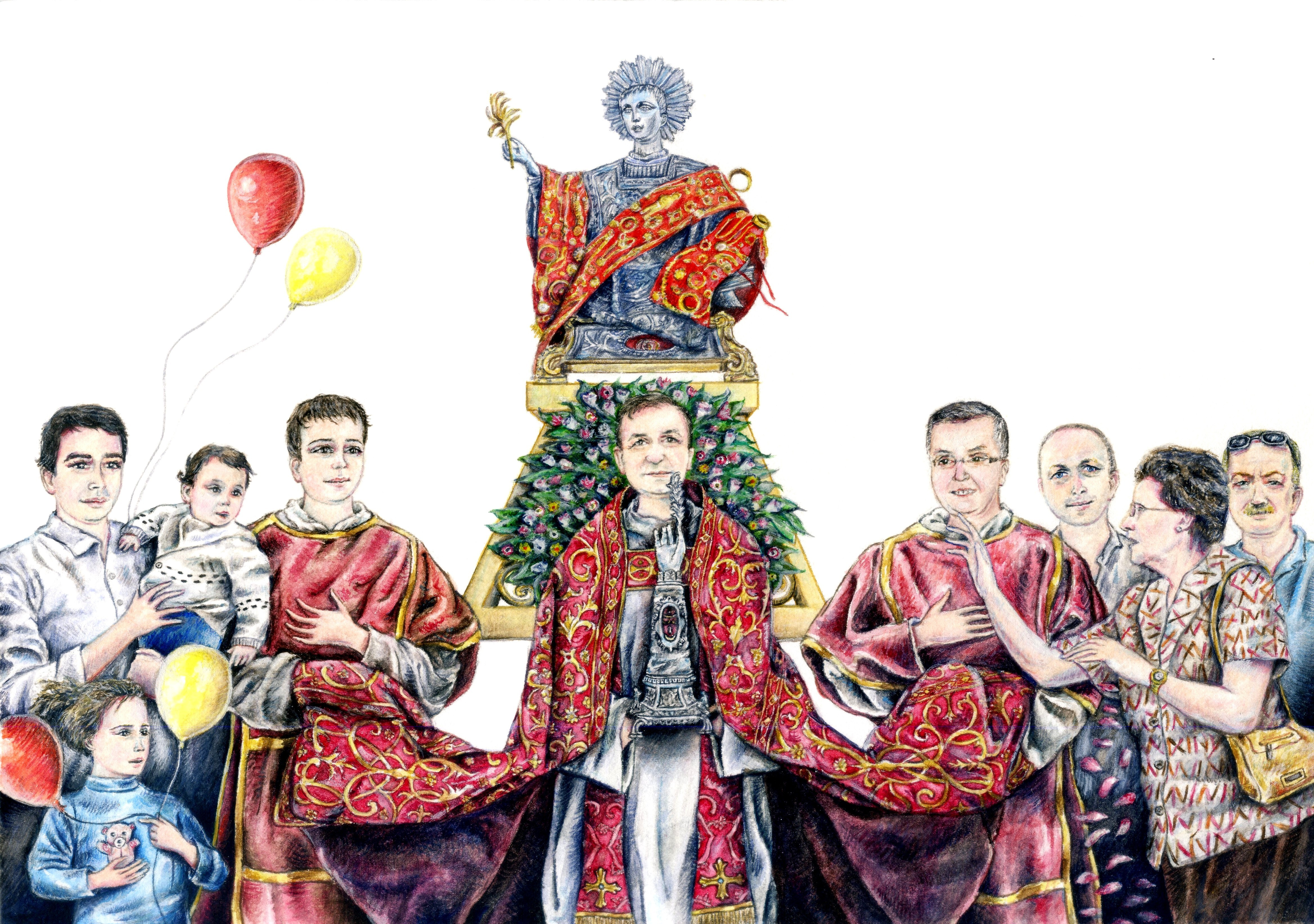 "La festa di San Cesario diacono e martire". La vita di Cesario non finisce in quel sacco, ma continua a vivere fino ad oggi grazie alla devozione e all'ammirazione che il popolo di Dio gli offre.